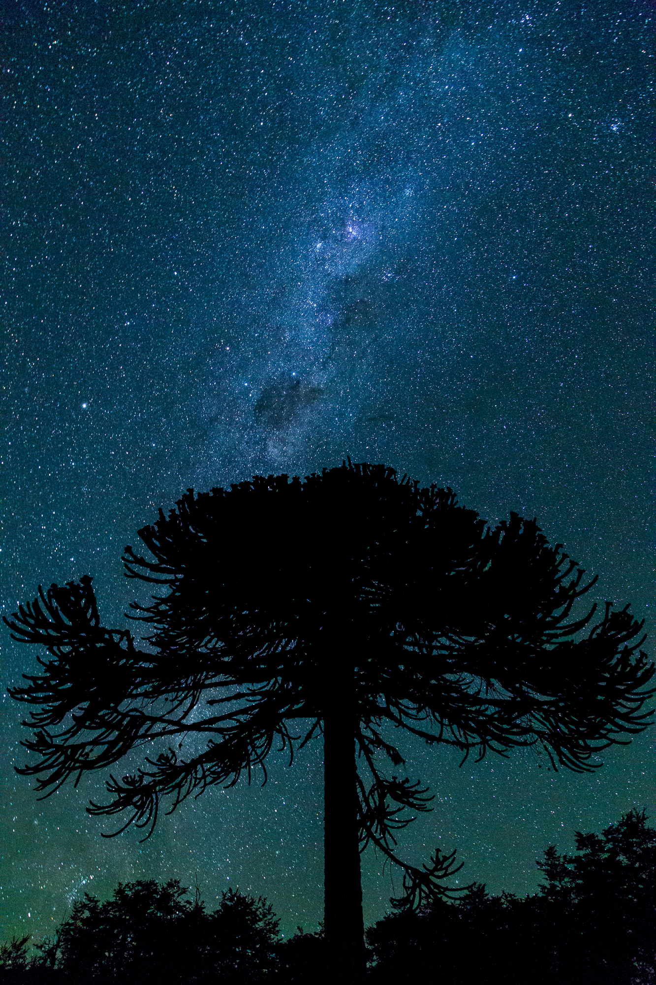 Parque nacional Conguillío